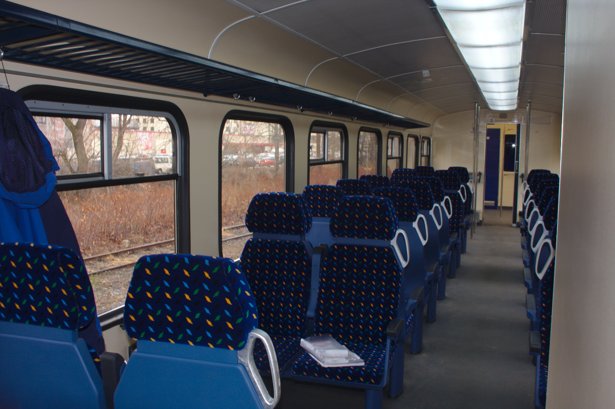 Wnętrze przedziału pasażerskiego SN82-002. Fotele z logo województwa śląskiego.